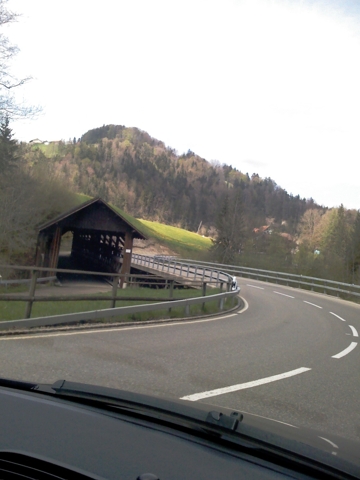 Wooden bridge between Mogelsberg and Ganterschwil, Toggenburg, Switzerland - Ligna ponto inter Mogelsberg kaj Ganterschwil en Togenburgo (Furth), Svislando